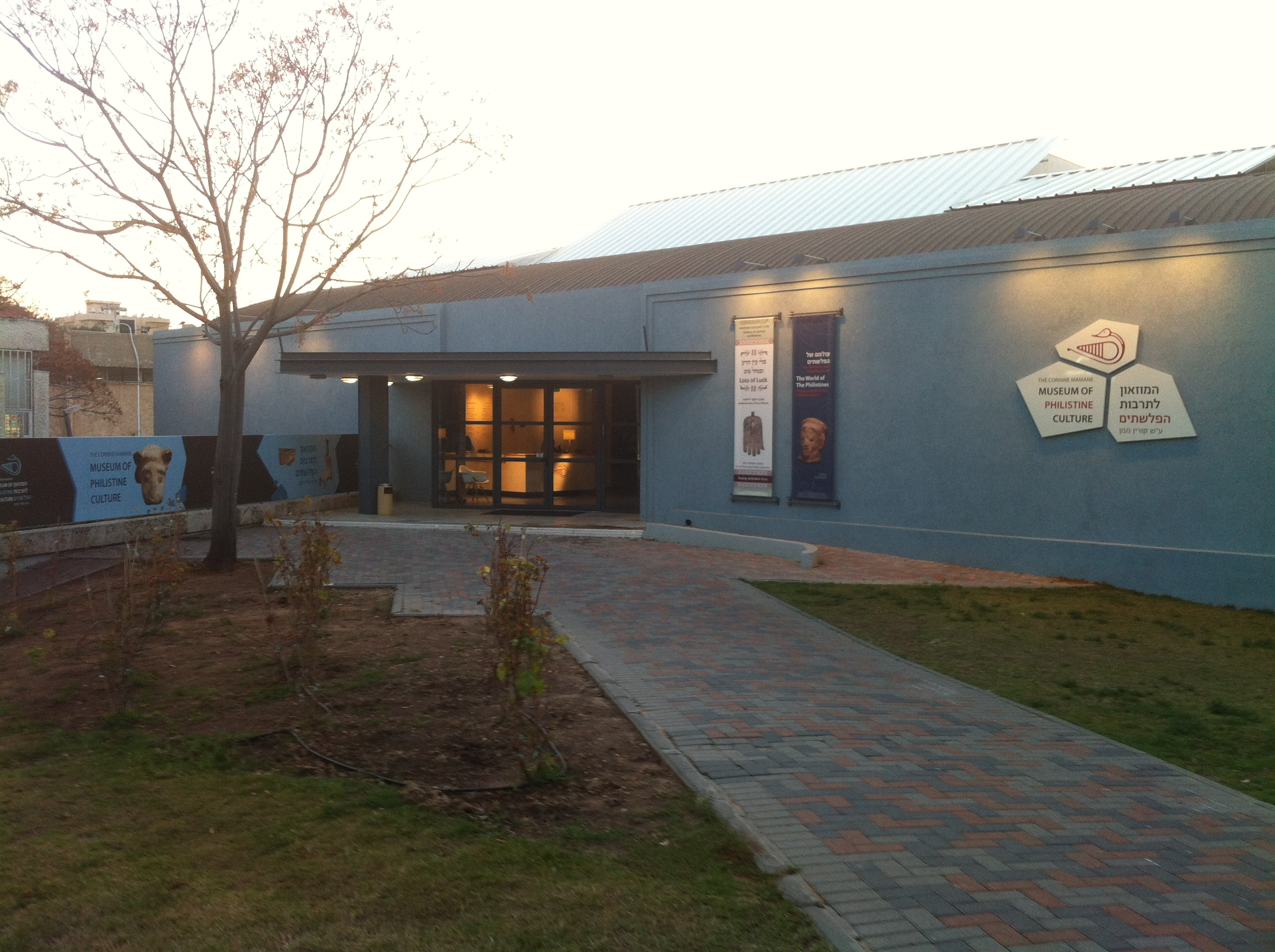 Philistine Culture Museum - המוזיאון לתרבות הפלשתים, אשדוד 2014